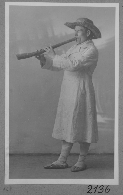 Karjapasunamängija